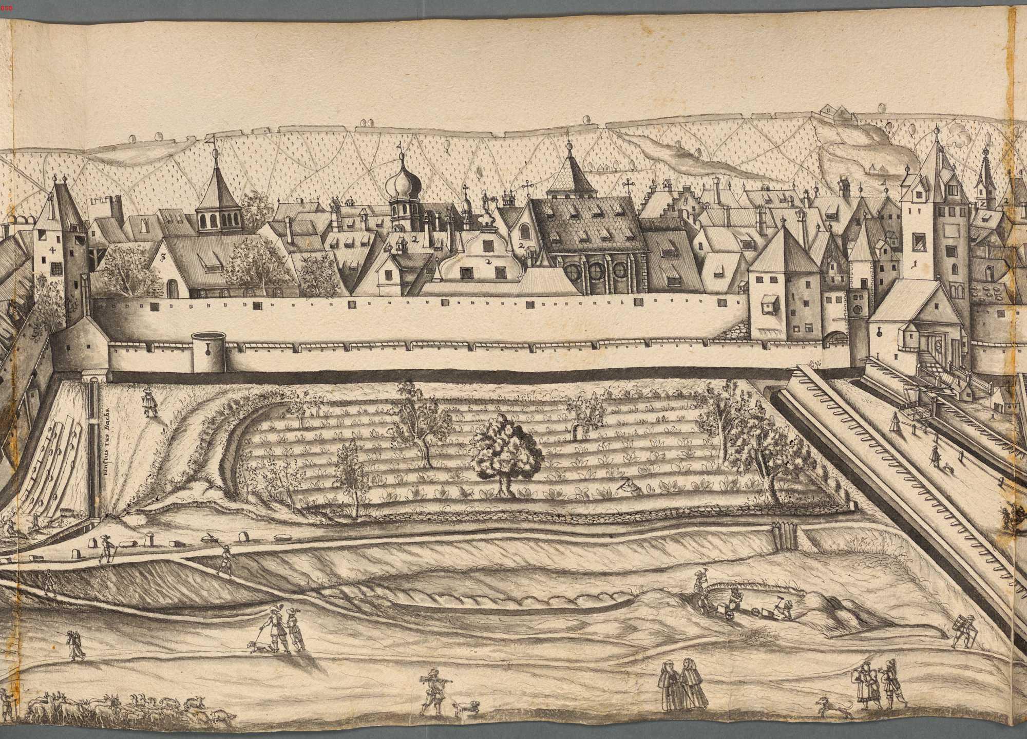 Ansicht der zerschossenen Stadt Regensburg. Ober-Münster, Vitusbach Einfluss, Weih St Peter Tor mit Werk. 2